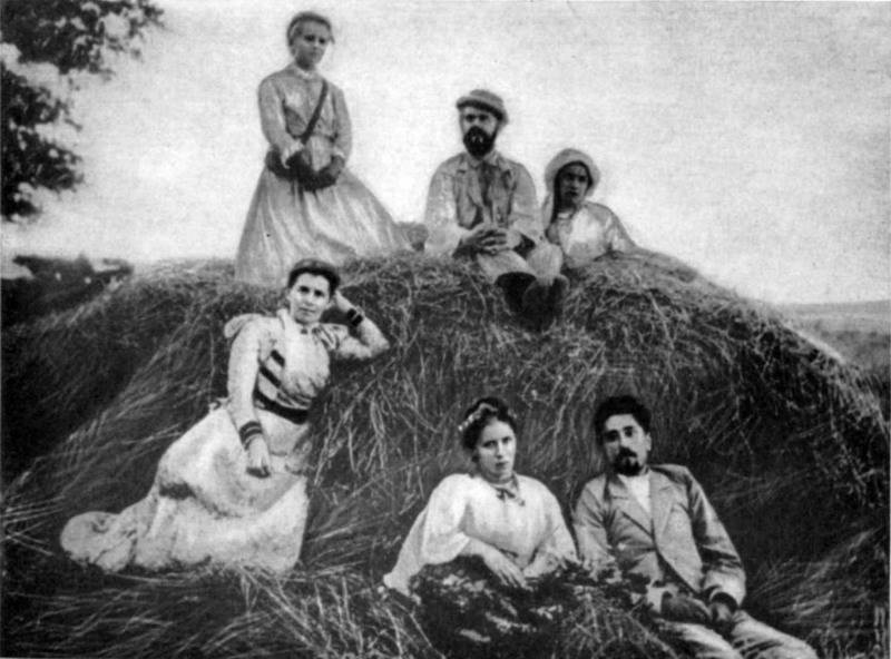 Верхній ряд : Ізидора Косач, О.П.Драгоманов, Ольга Косач; нижній ряд : Олена Пчілка, Леся Українка, С.К.Мержинський. Гадяч, фото 8 (20) липня 1898 р.